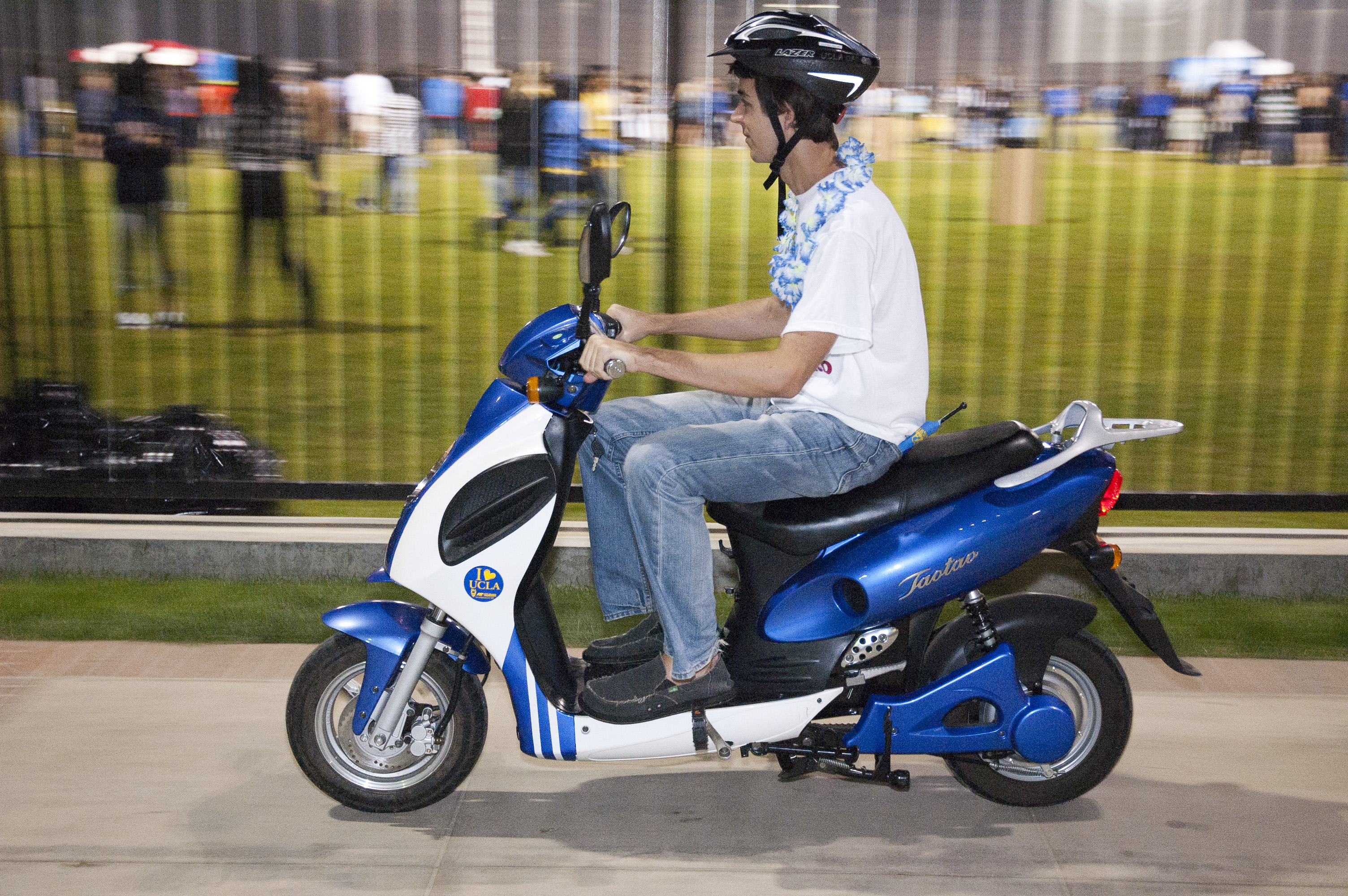 Electric bicycle